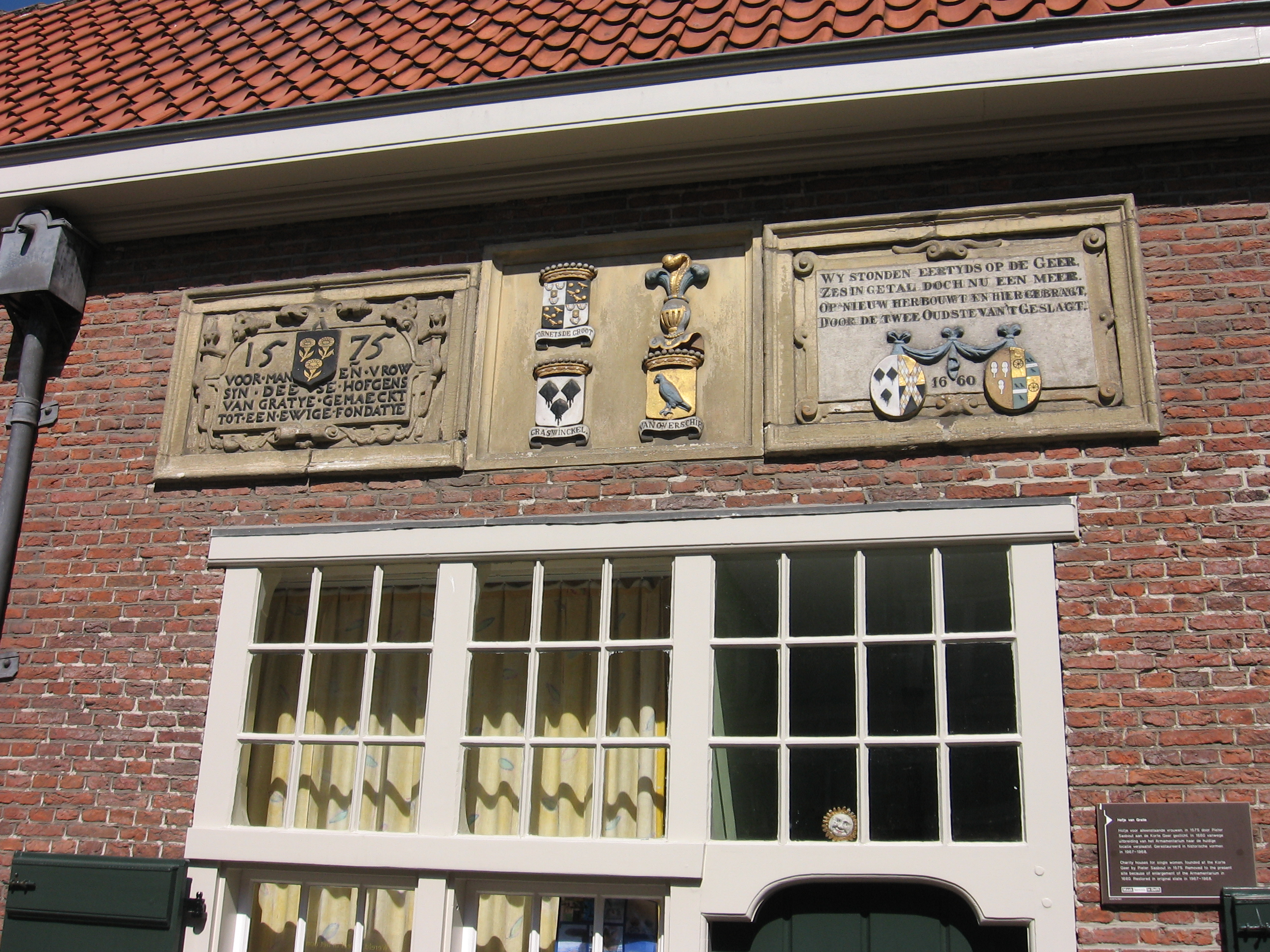 Hofje van Gratie, Delft